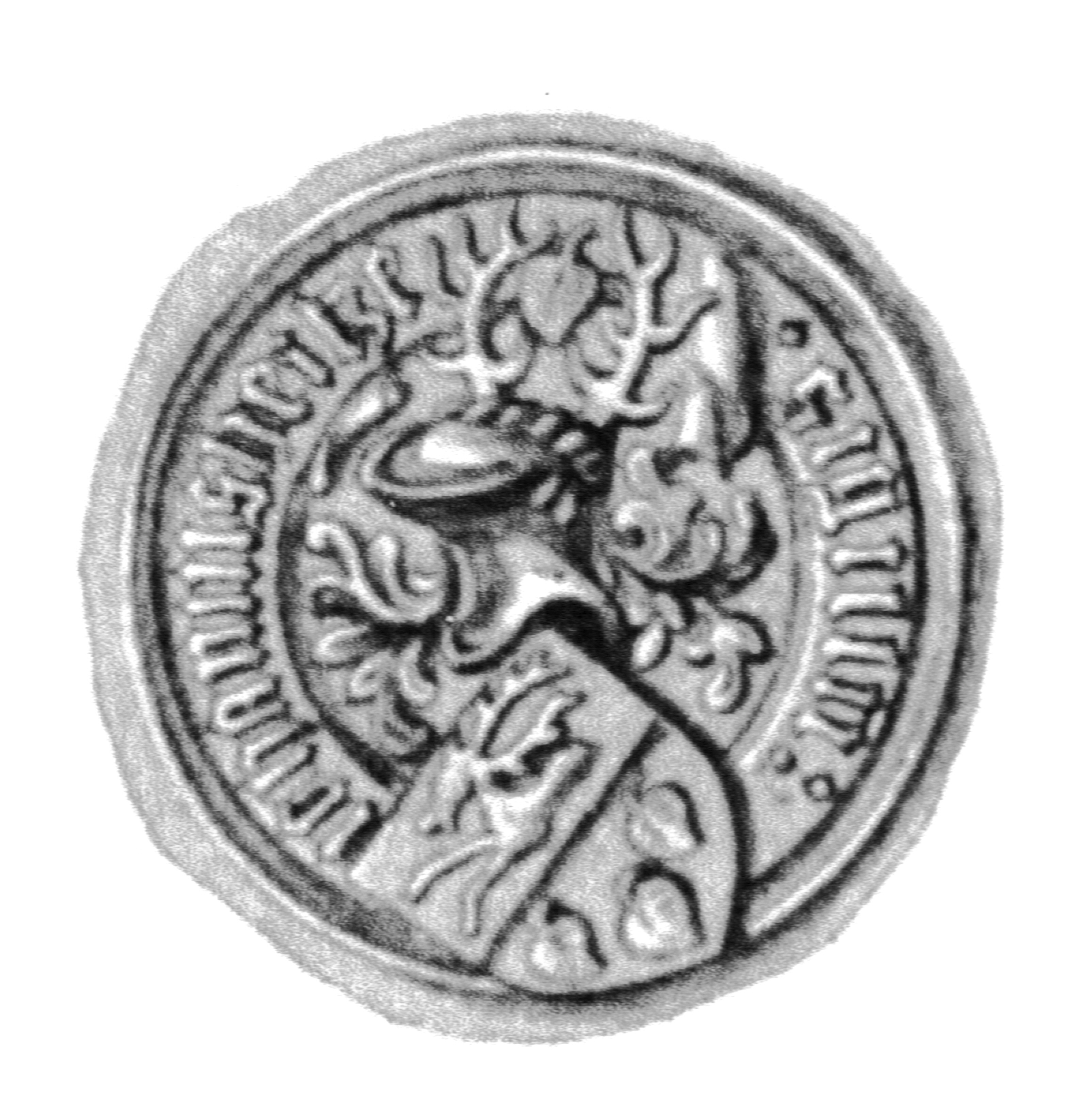 Siegel des Ratsmannes Johann Hertze. Das Siegel stammt aus der Zeit um 1476. Siehe Emil Ferdinand Fehling: Lübeckische Ratslinie, Nr. 547 (Johann Hertze).